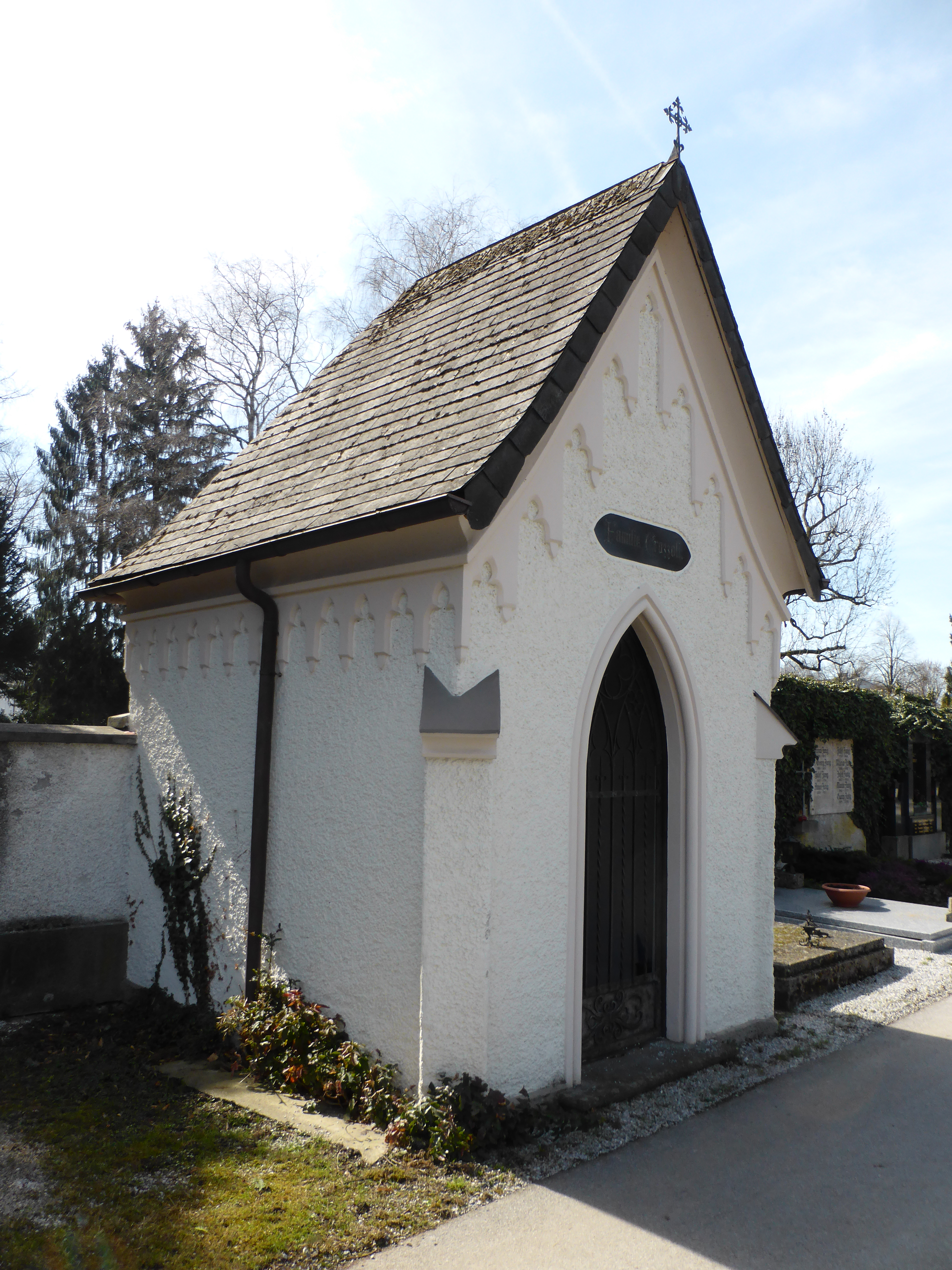 Kath. Pfarrkirche Maxglan, Begräbnisstätte der Familie Crozzoli